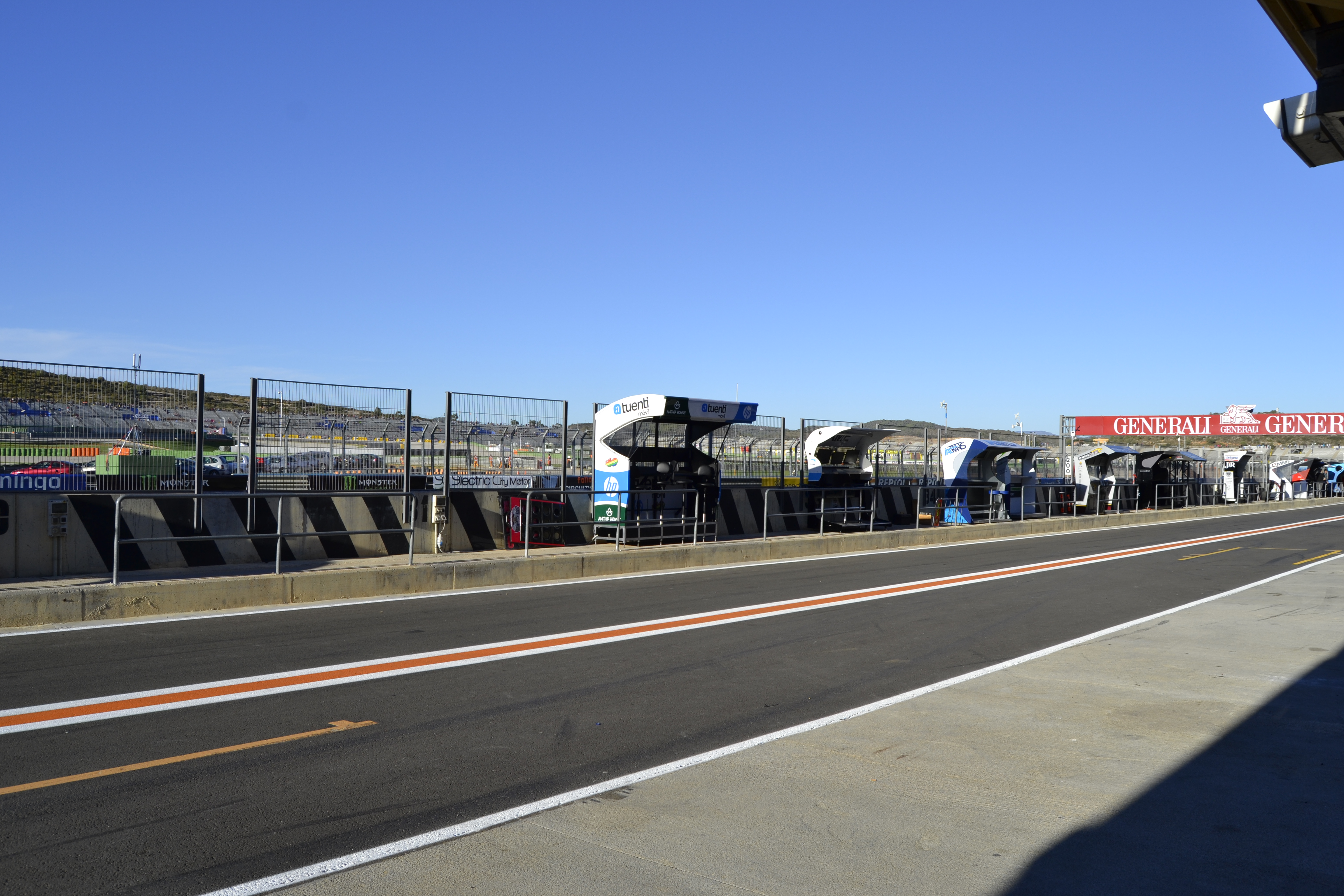 FOTO TOMADA EN EL PADDOCK DEL GP DE LA COMUNIDAD VALENCIANA EN 2013